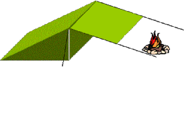 Schematisch overzicht van een door mij gemaakte tent.